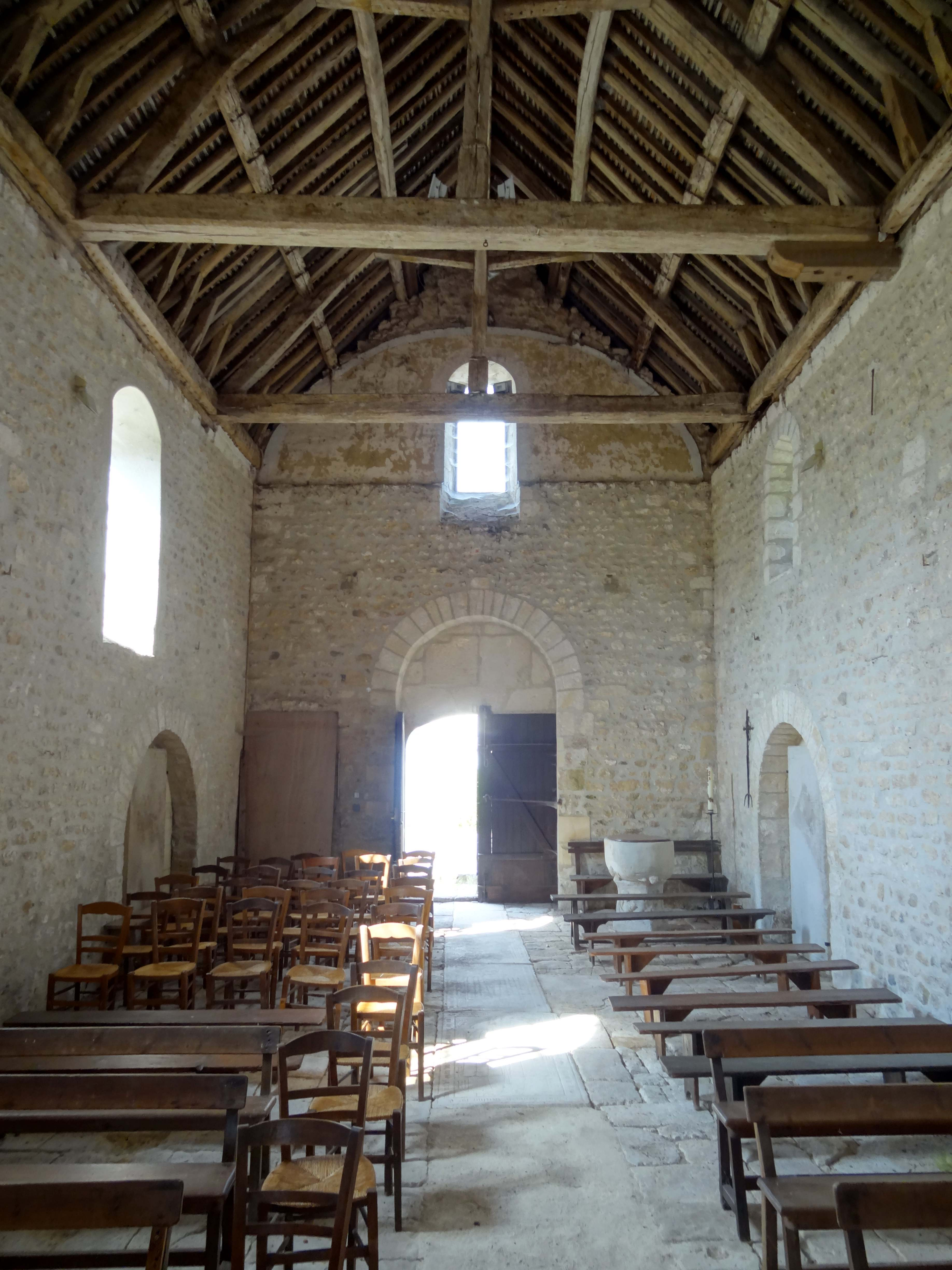 Intérieur de l'église - voir titre.